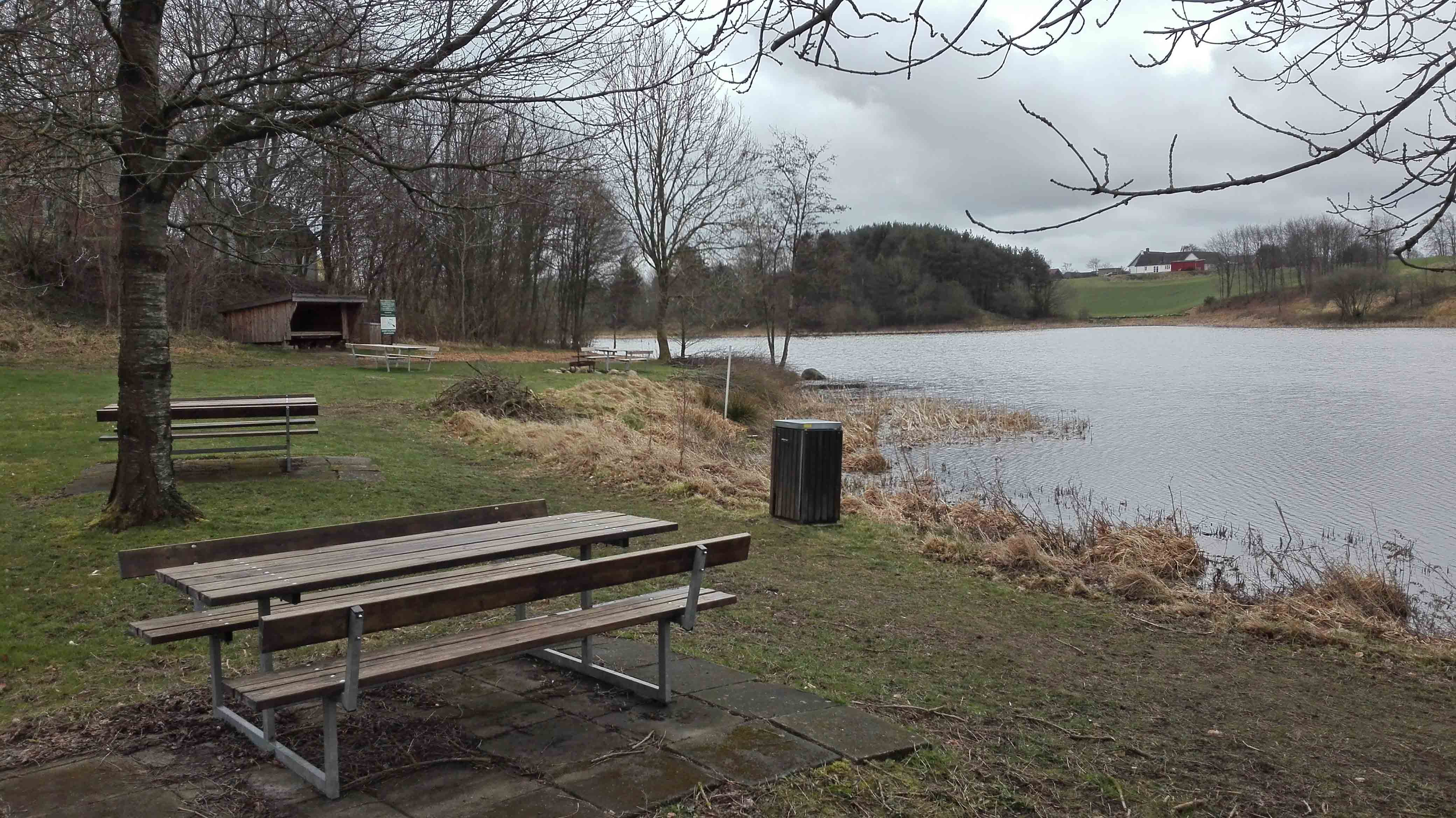 Shelter og bord/bænkesæt ved Klokkerholm Møllesø